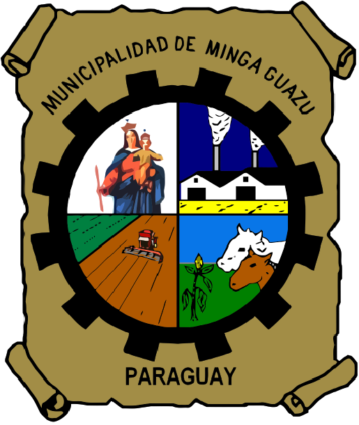 Escudo Minga Guazú